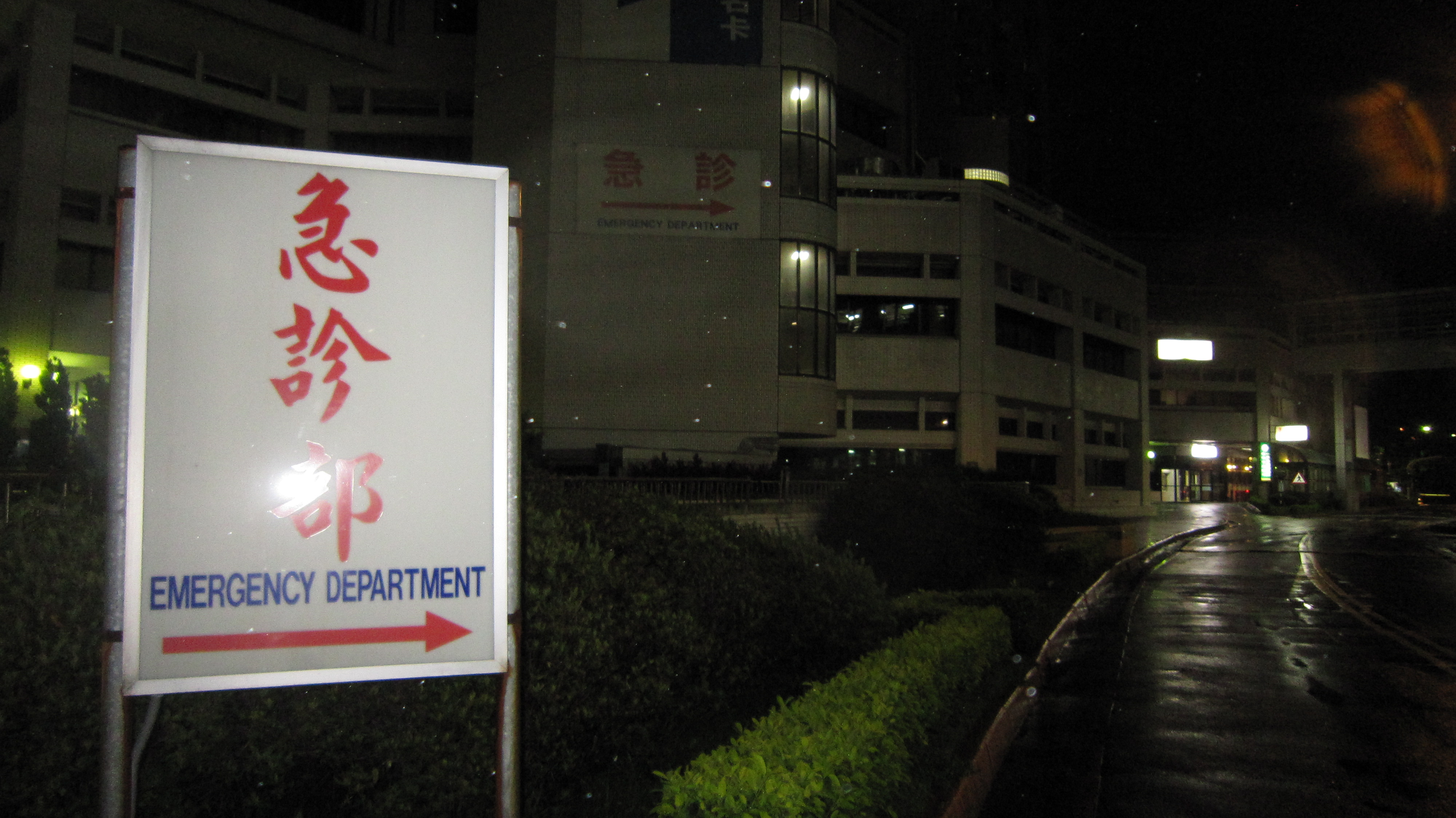 前民主進步黨主席許信良送榮總急救中